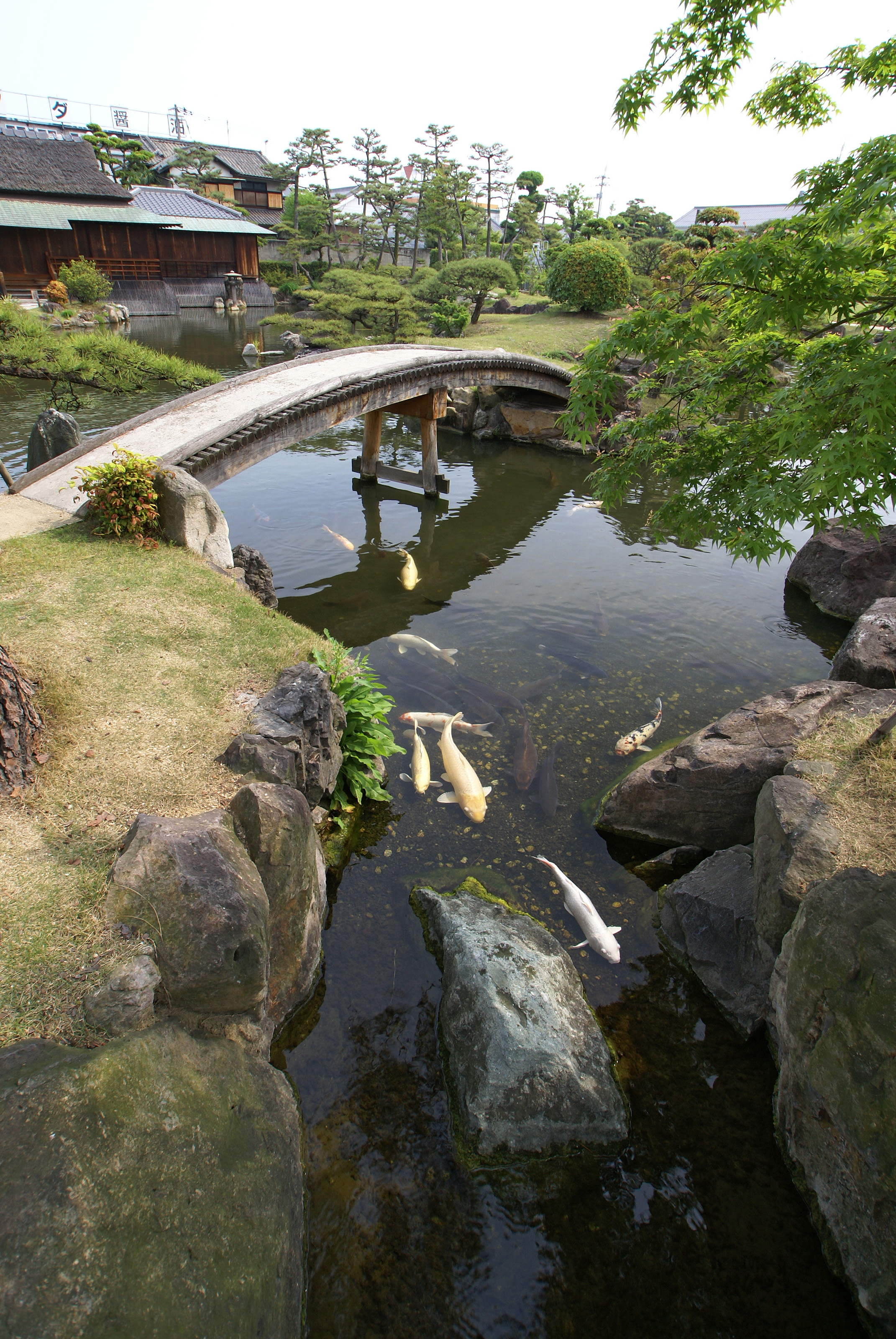 Kofuen in Sakaide, Kagawa prefecture, Japan